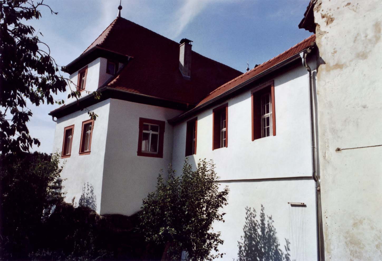 Schloss Plankenfels, Verbindungsbau zwischen Süd- und Nordflügel